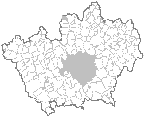 Ubicación de la ciudad de Milán en la provincia homonima.